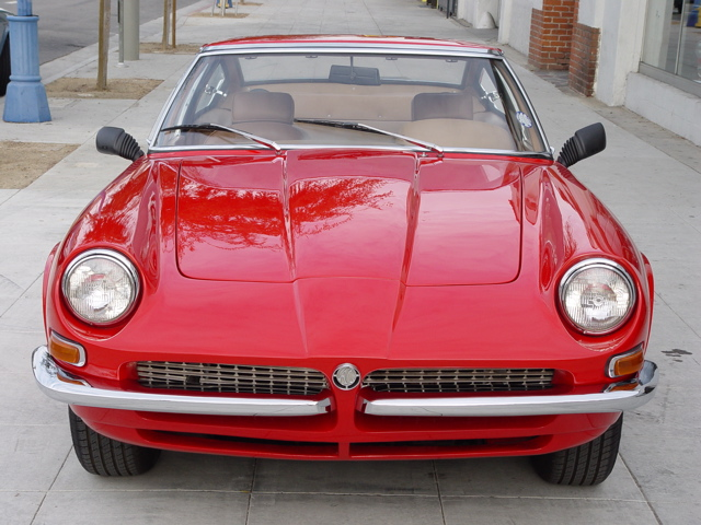 1968 AC Frua coupe